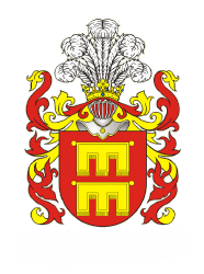 Chorągwie Kmitów Clan